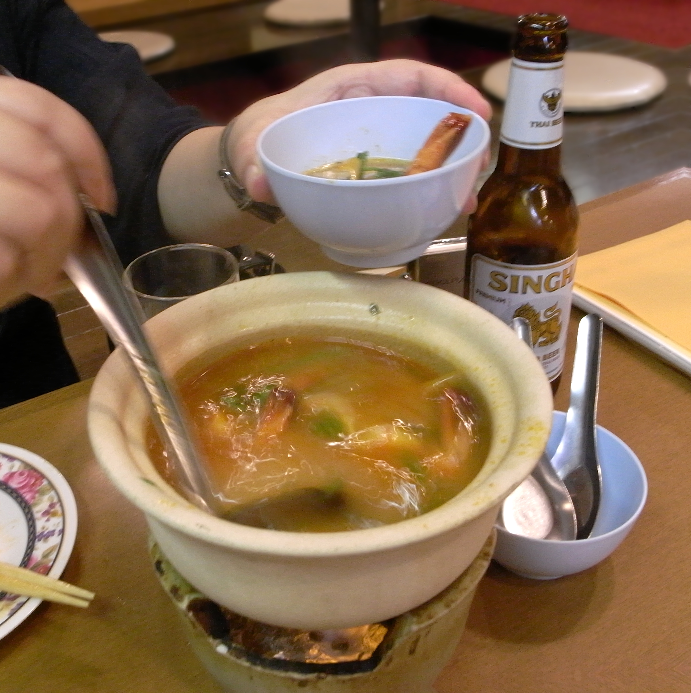 Tom Yum Goong (Scharf-saure Garnelensuppe) – Feuertopf-Gericht aus Thailand.